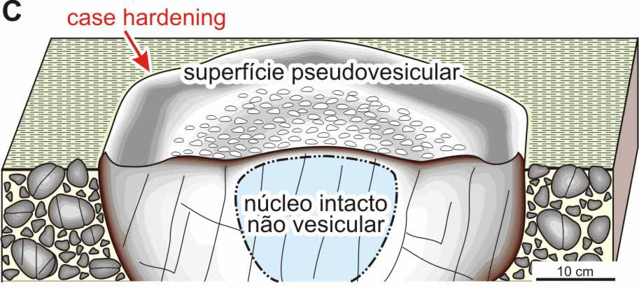 Case hardening pseudobomb